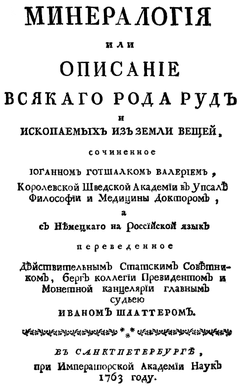 Wallerius J.G. Mineralogia, eller mineralriket indelt och beskrifvet. Stockholm: Salvii, 1747. [36], [1] 479, [1] s. ; Ibid. Berlin: Nicolai, 1750. [48], [1] 600, [32] s. ; Ibid. Paris: Durand, Pissot, 1753. [2], 569, [3] p. ; То же [Валлерий И. Минералогия или описание всякаго рода руд и ископаемых из земли вещей, cочинённое Иоганном Готшалком Валерием, Королевской Шведской академии в Упсале философии и медицины доктором / Перевод с нем. И. Шлаттер [по кн. 1750 г.]. СПб: ИАН, 1763. [6], 699, [34] с.